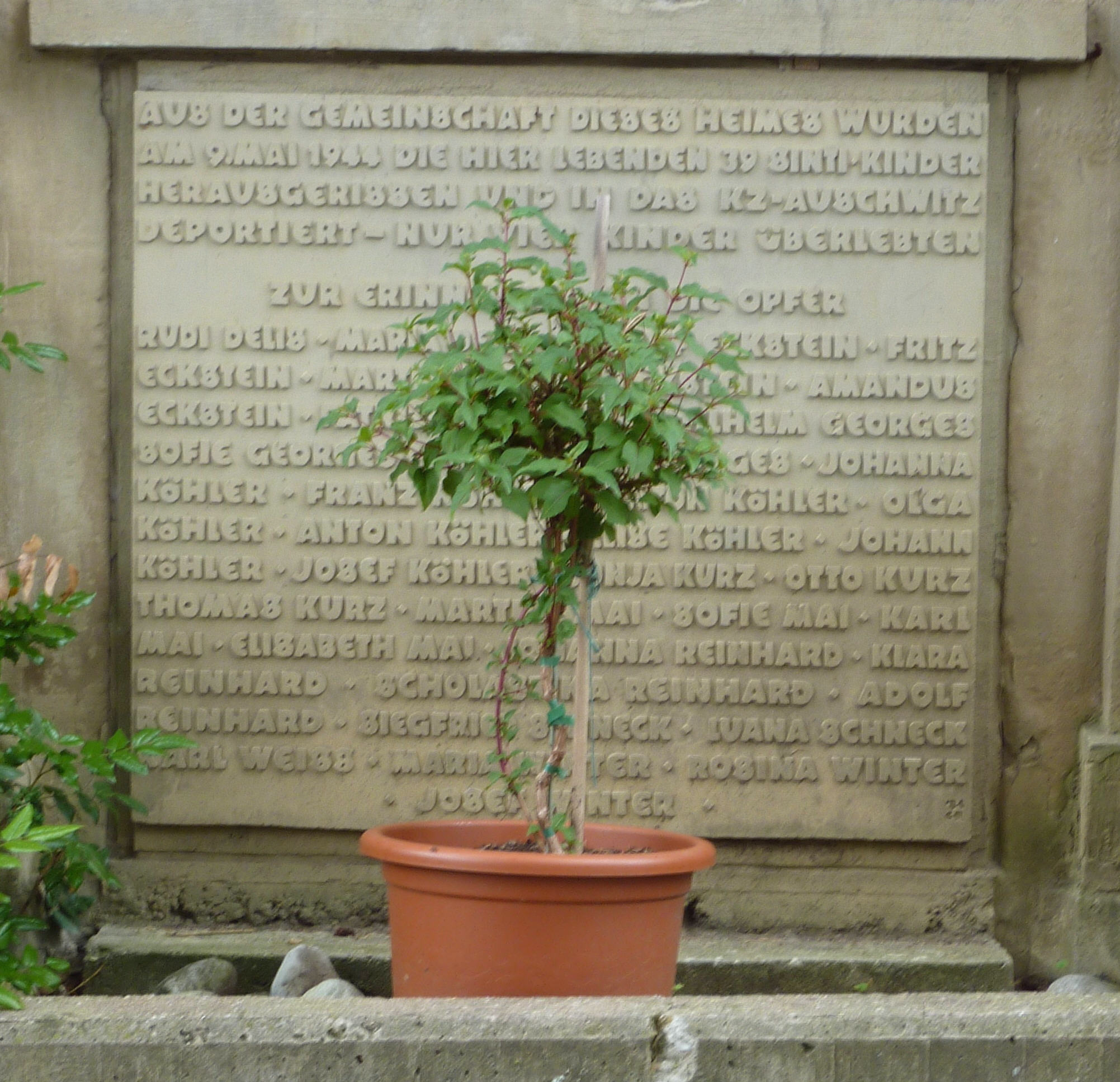 Gedenktafel für die Mulfinger Sintikinder in der St. Josephspflege, die nach Auschwitz deportiert wurden